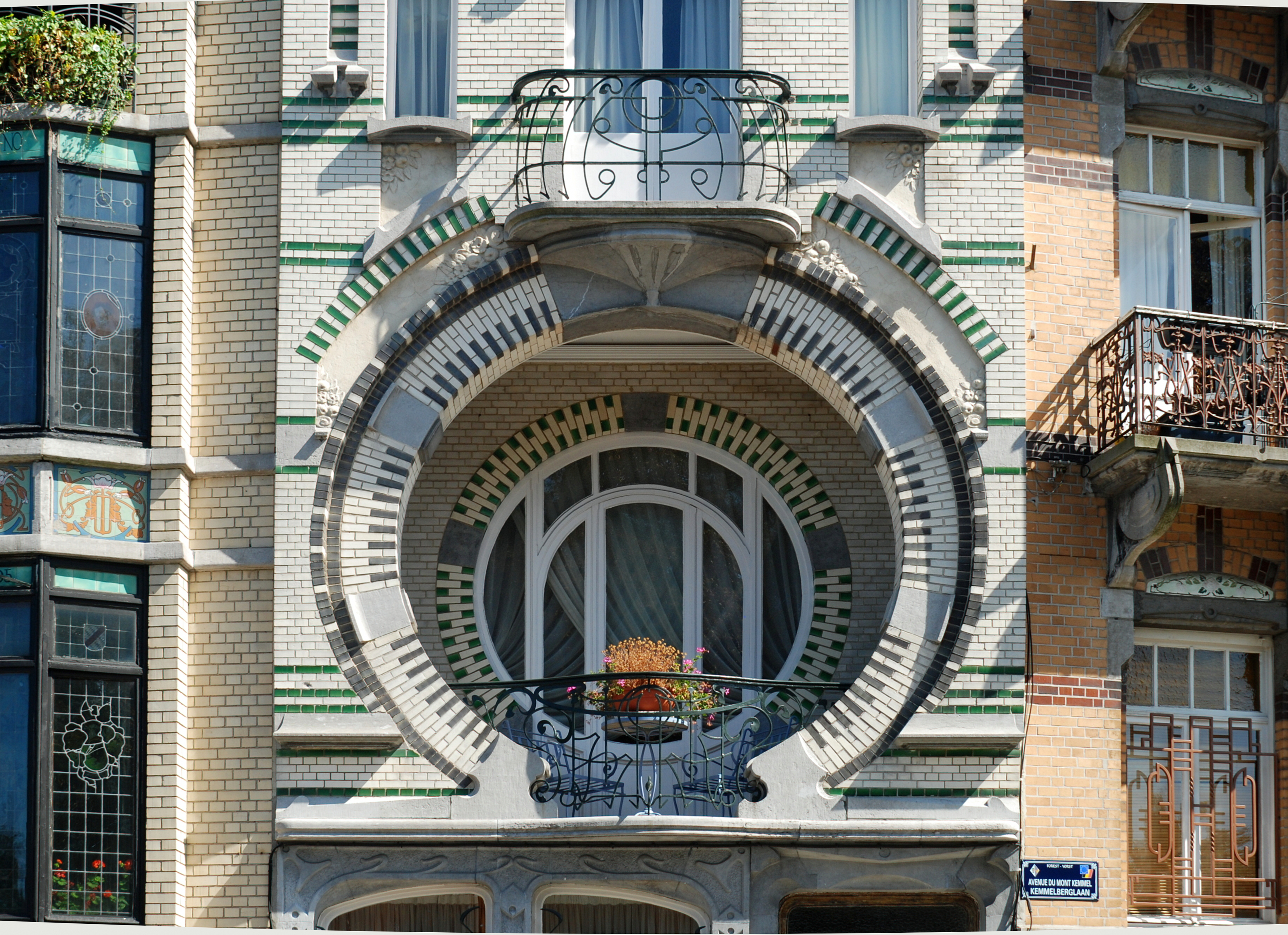 Belgique - Bruxelles - Maison Nelissen